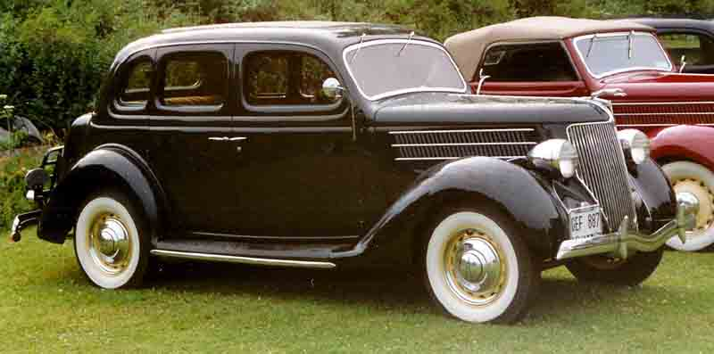 Ford Model 68 730 De Luxe Fordor Touring Sedan 1936